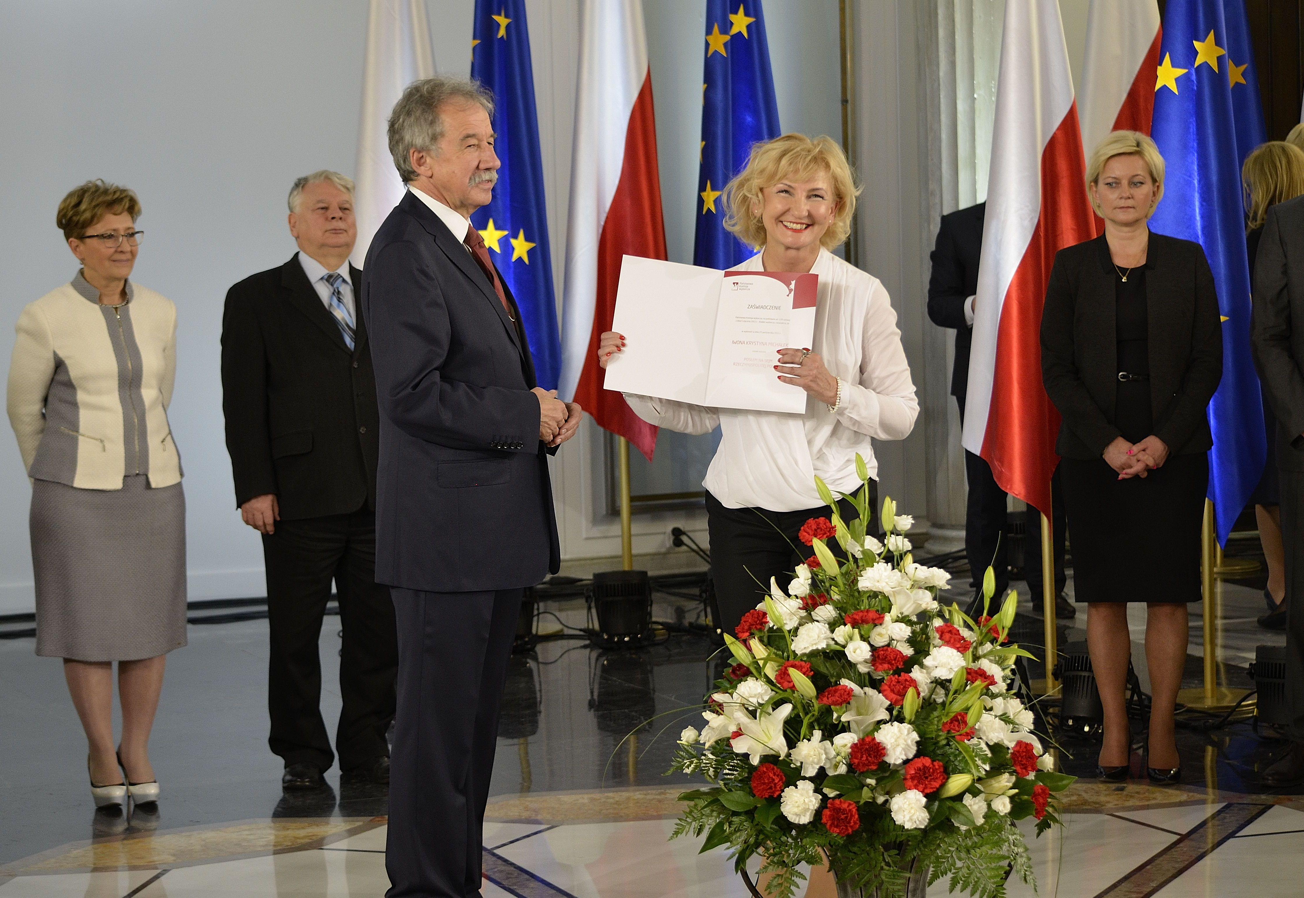 Posłanka Iwona Michałek podczas uroczystości wręczenia zaświadczeń o wyborze nowo wybranym posłom w Sali Kolumnowej Sejmu